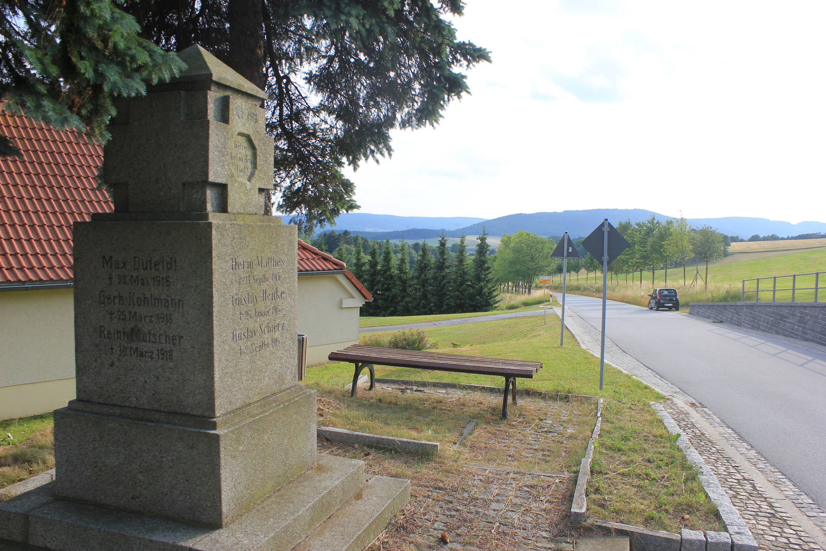 Hornjoserbsce: Wojerski pomnik za padnjenych Prěnjeje swětoweje wójny w Kózłach.